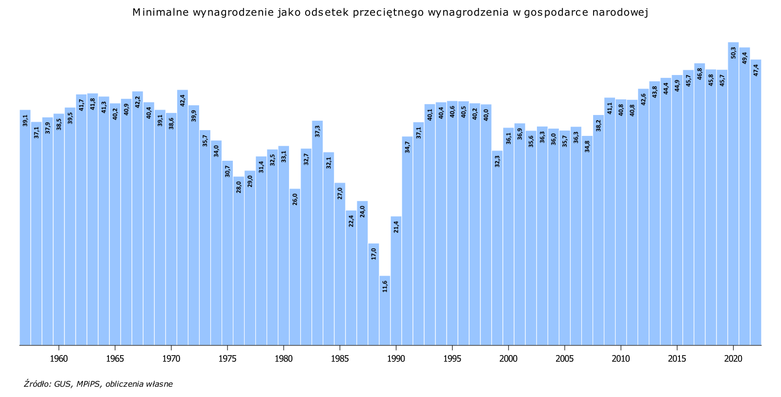 Minimalne wynagrodzenie jako odsetek przeciętnego wynagrodzenia w gospodarce narodowej. Wykres na podstawie danych: 1. Ministerstwo Pracy i Polityki Socjalnej - Minimalne wynagrodzenie za pracę 2. Główny Urząd Statystyczny - Przeciętne miesięczne wynagrodzenie w gospodarce narodowej w latach 1950-2015